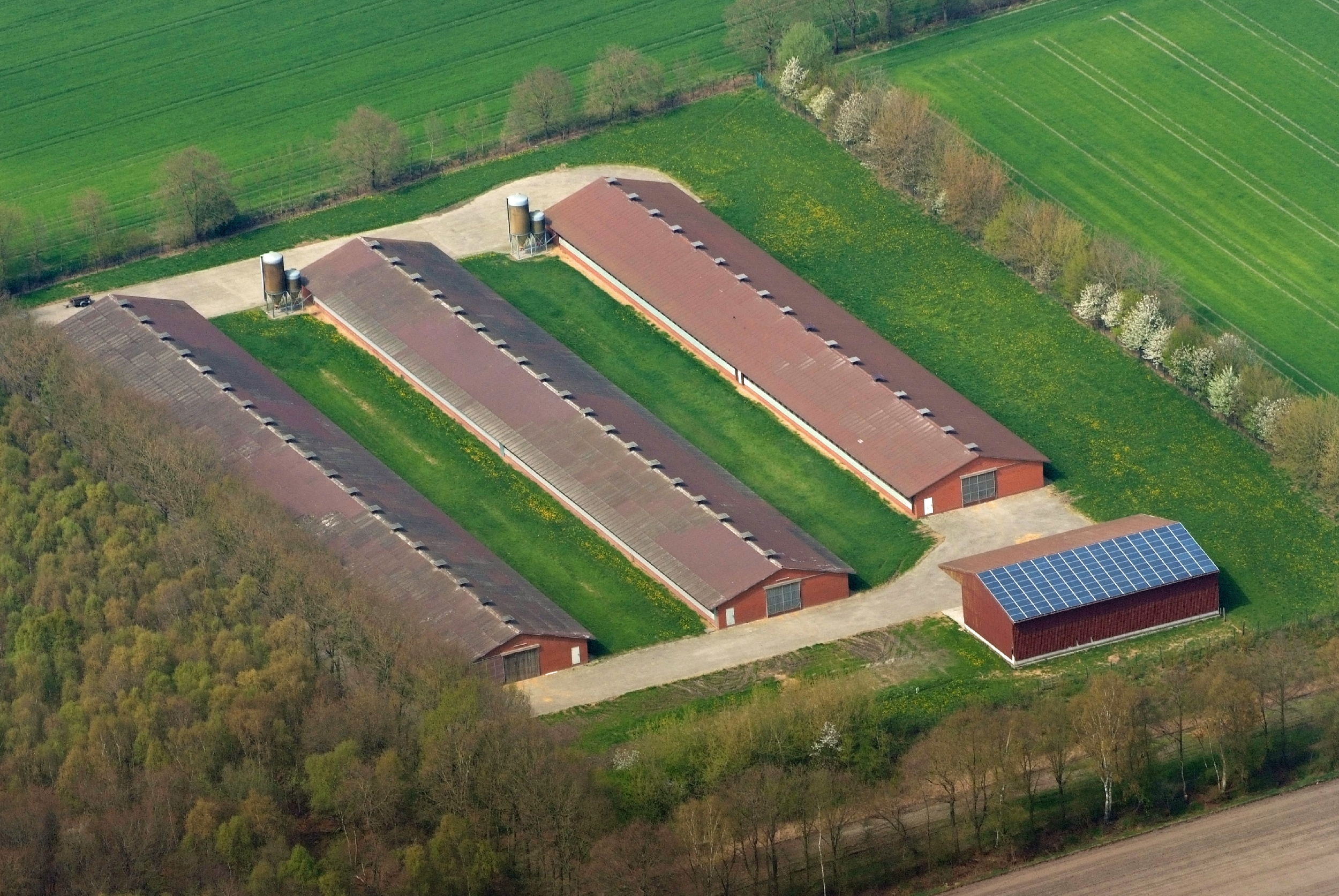 Massentierhaltung in Kamperfehn (Landkreis Cloppenburg) / Fotoflug von Nordholz-Spieka nach Oldenburg und Papenburg